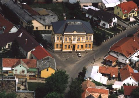 Újfehértó, Hungary, aerialphotgraphy